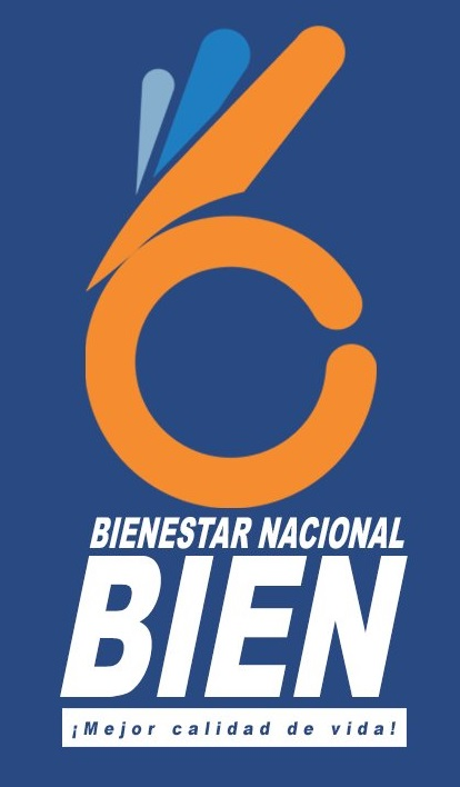 Partido político Bienestar Nacional.